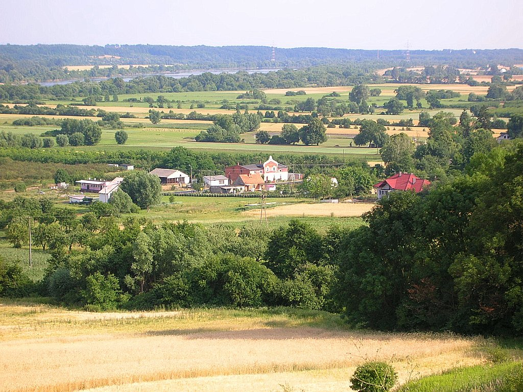 Grodzisko w Strzelcach Dolnych. Widok ze szczytu na Dolinę Fordońską - kierunek płd.